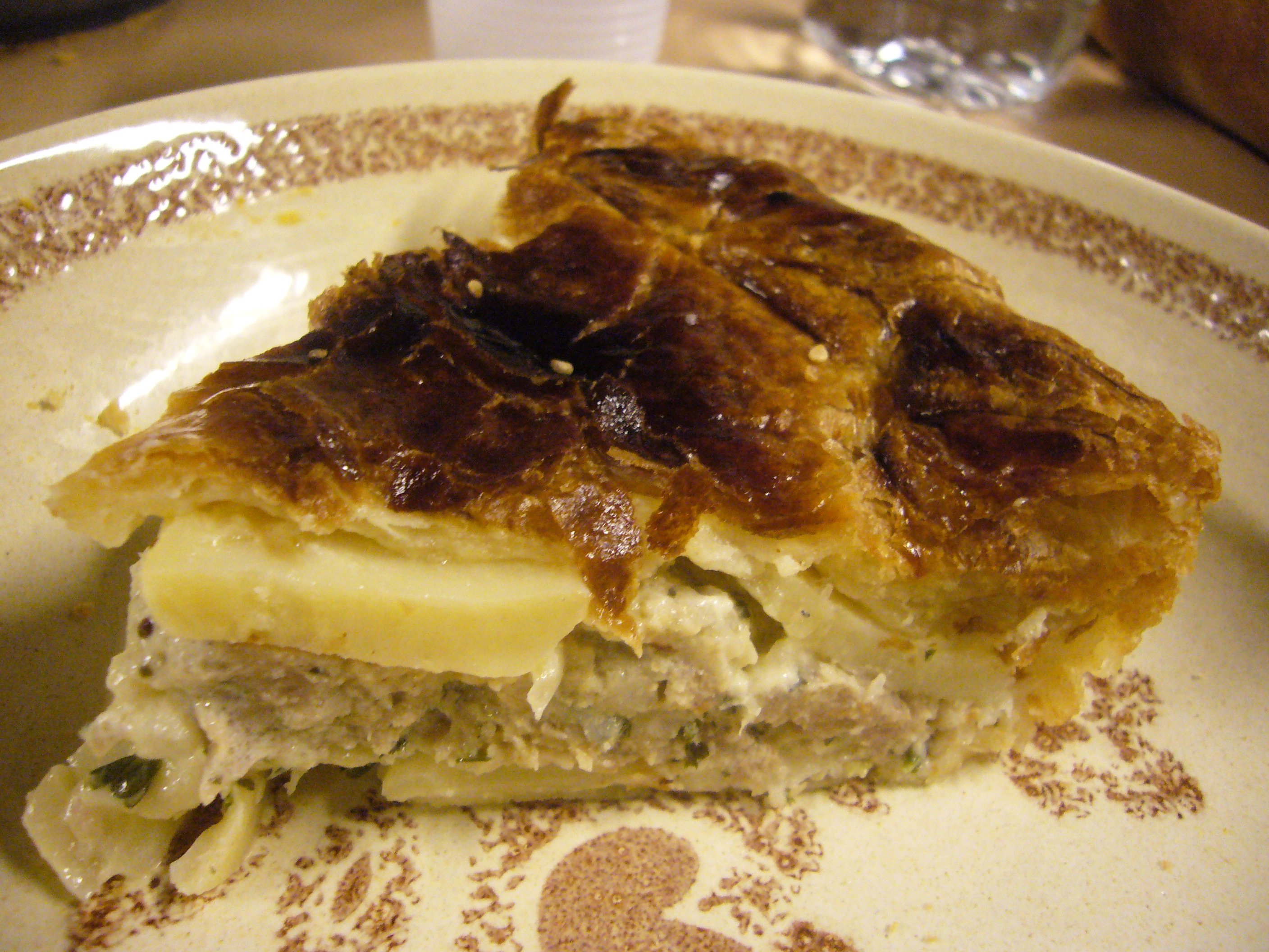 Part de pâté de pommes de terre, spécialité culinaire du Limousin (Veyrac, Haute-Vienne, le 15 novembre 2008)